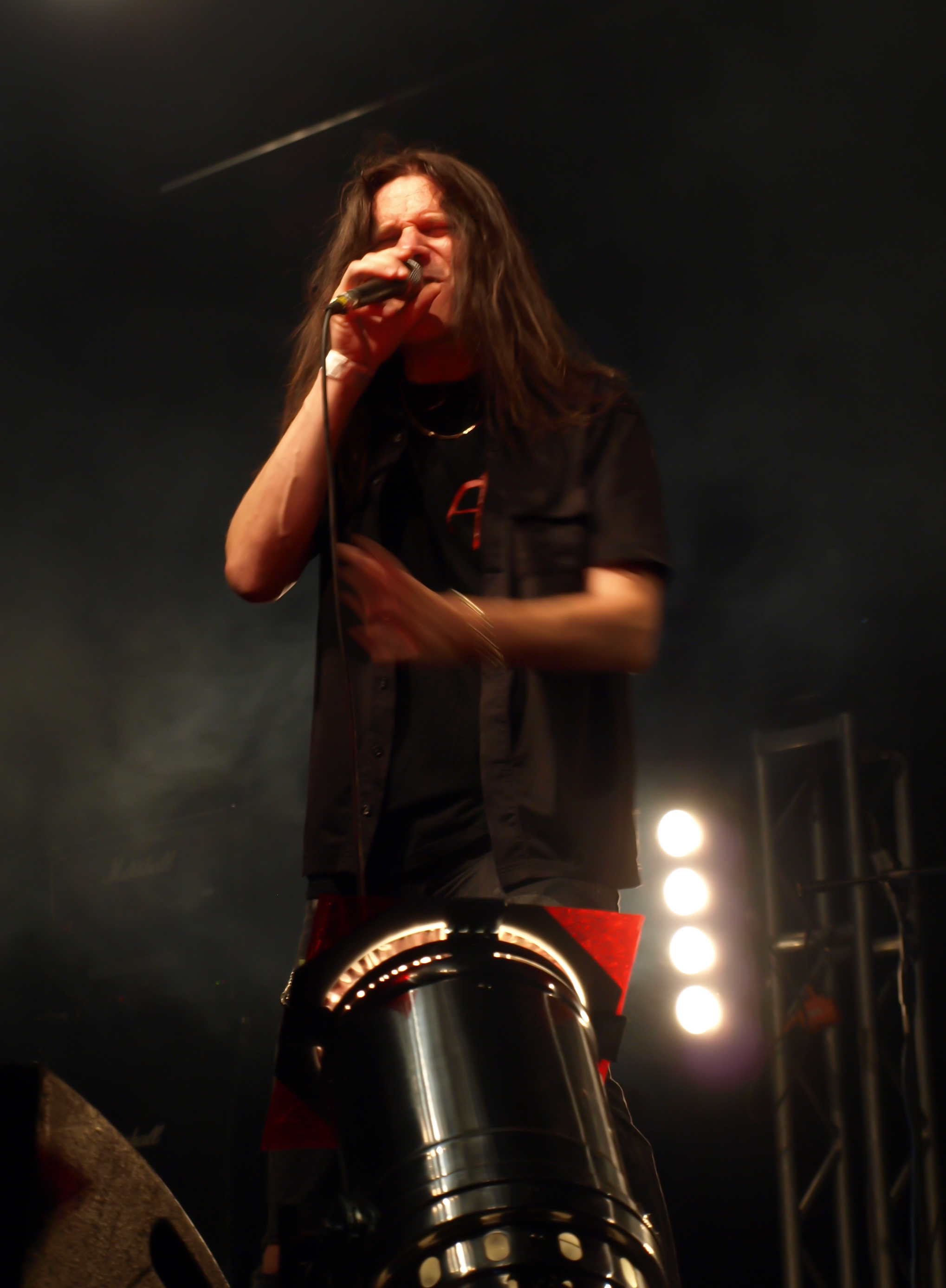 Die schwedische Heavy-Metal-Band Astral Doors bei ihrem Auftritt am Jalometalli 2008 in Oulu.